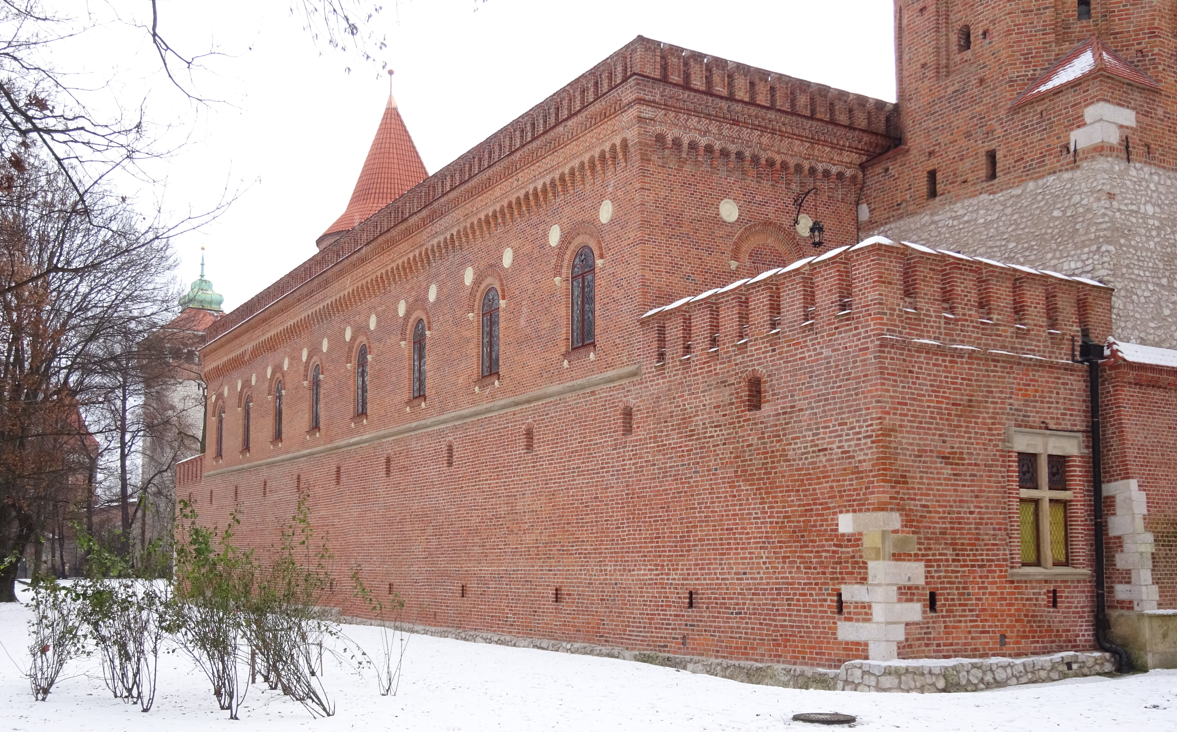 Arsenał Miejski w Krakowie. Widok w zimowej scenerii, po remoncie - 2017.